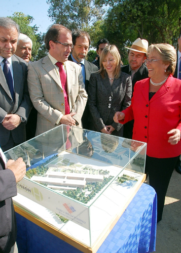 El alcalde de Maipú, Alberto Undurraga, y la presidenta de Chile, Michelle Bachelet, hacen entrega de los terrenos al grupo español San José Tecnocontrol para que construya en Hospital de Maipú. Santiago de Chile, 5 de enero de 2010.